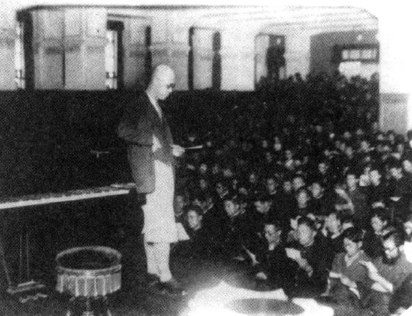 明治大学で校歌の指揮を執る山田耕筰